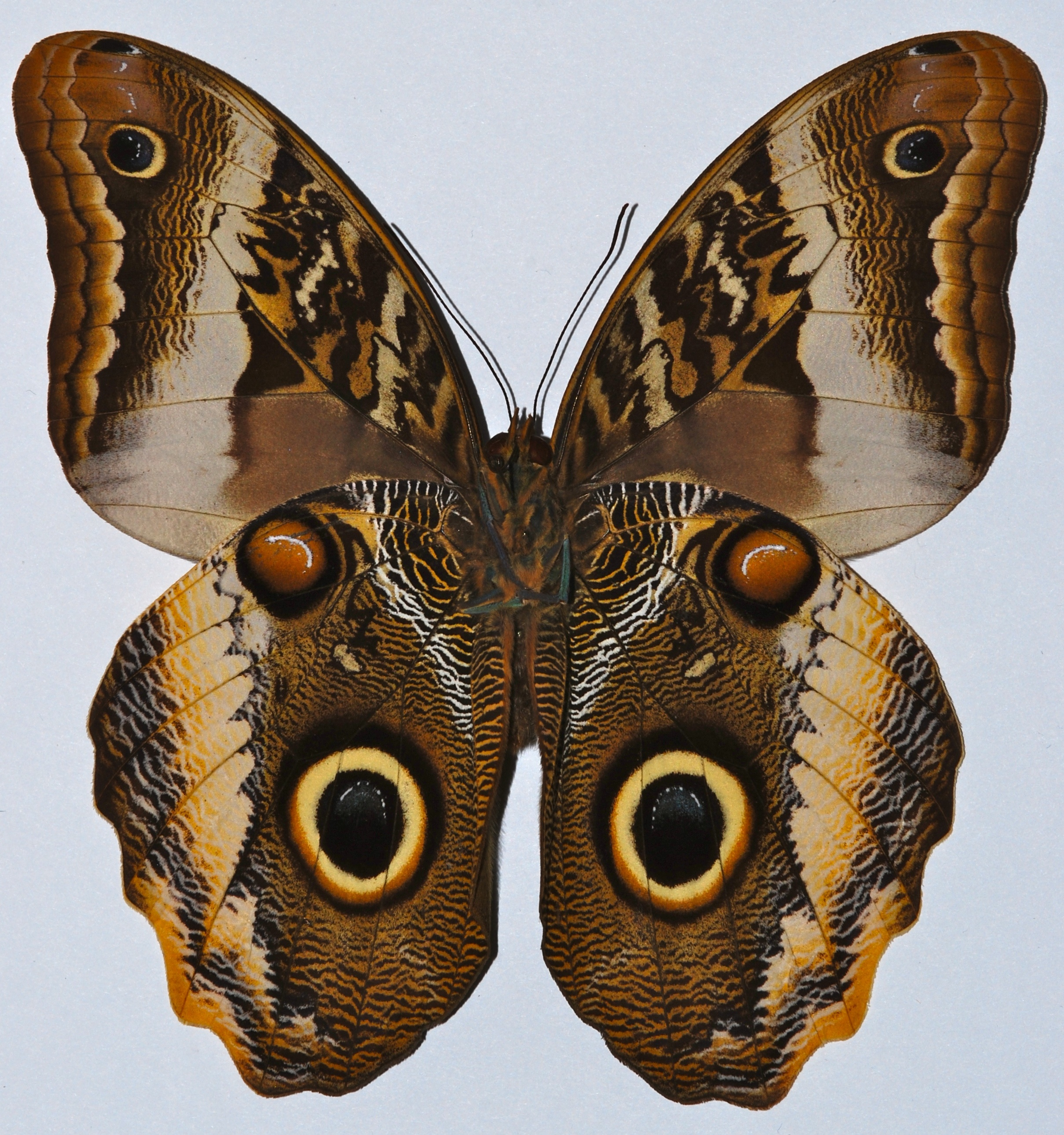 Guapiles, COSTA RICA